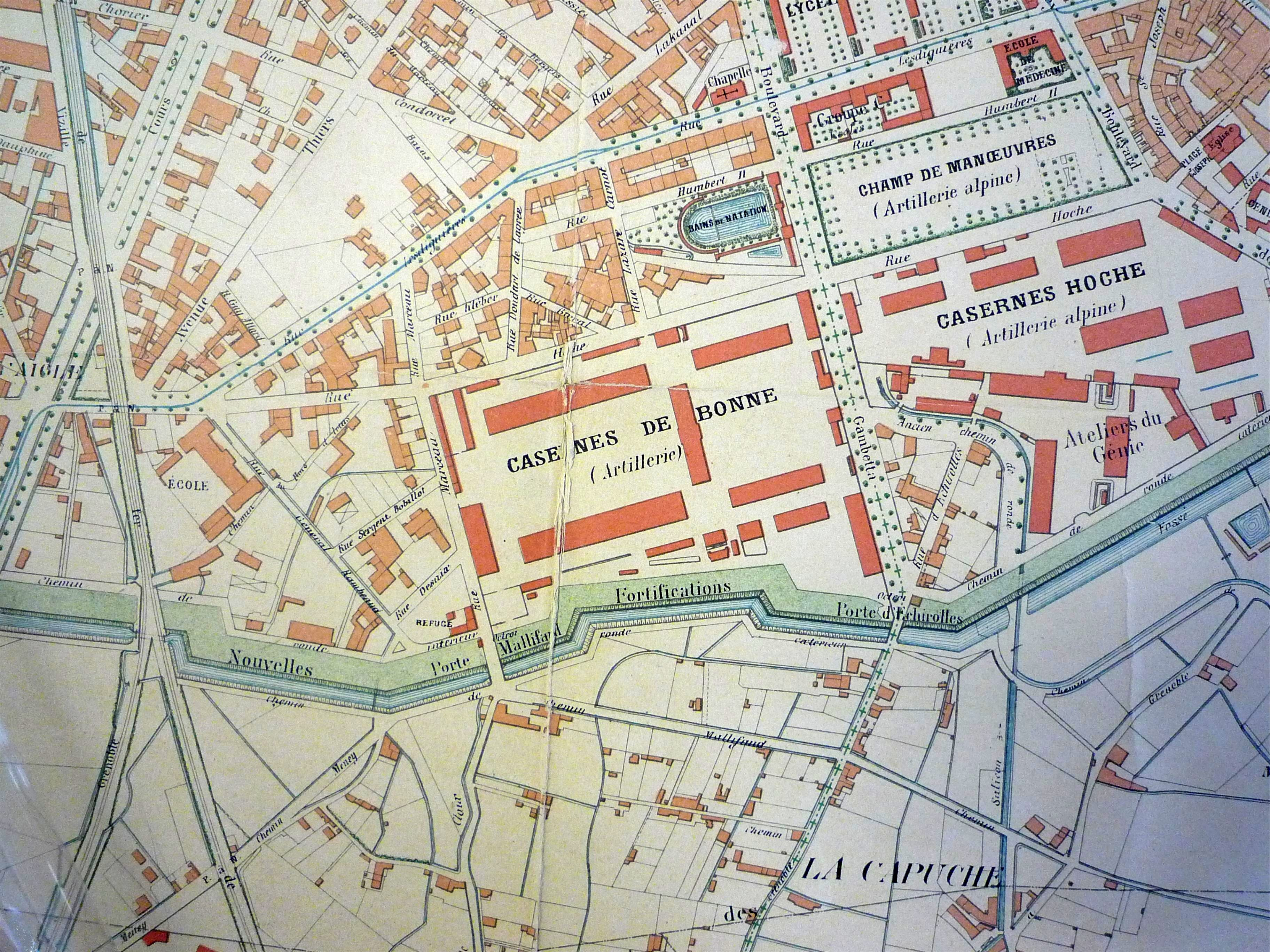 Extrait plan de Grenoble en 1902. Zone des grands boulevards actuels, du cours Jean Jaurès (gauche) à la place Pasteur (droite). Les remparts tracés datent de 1879.